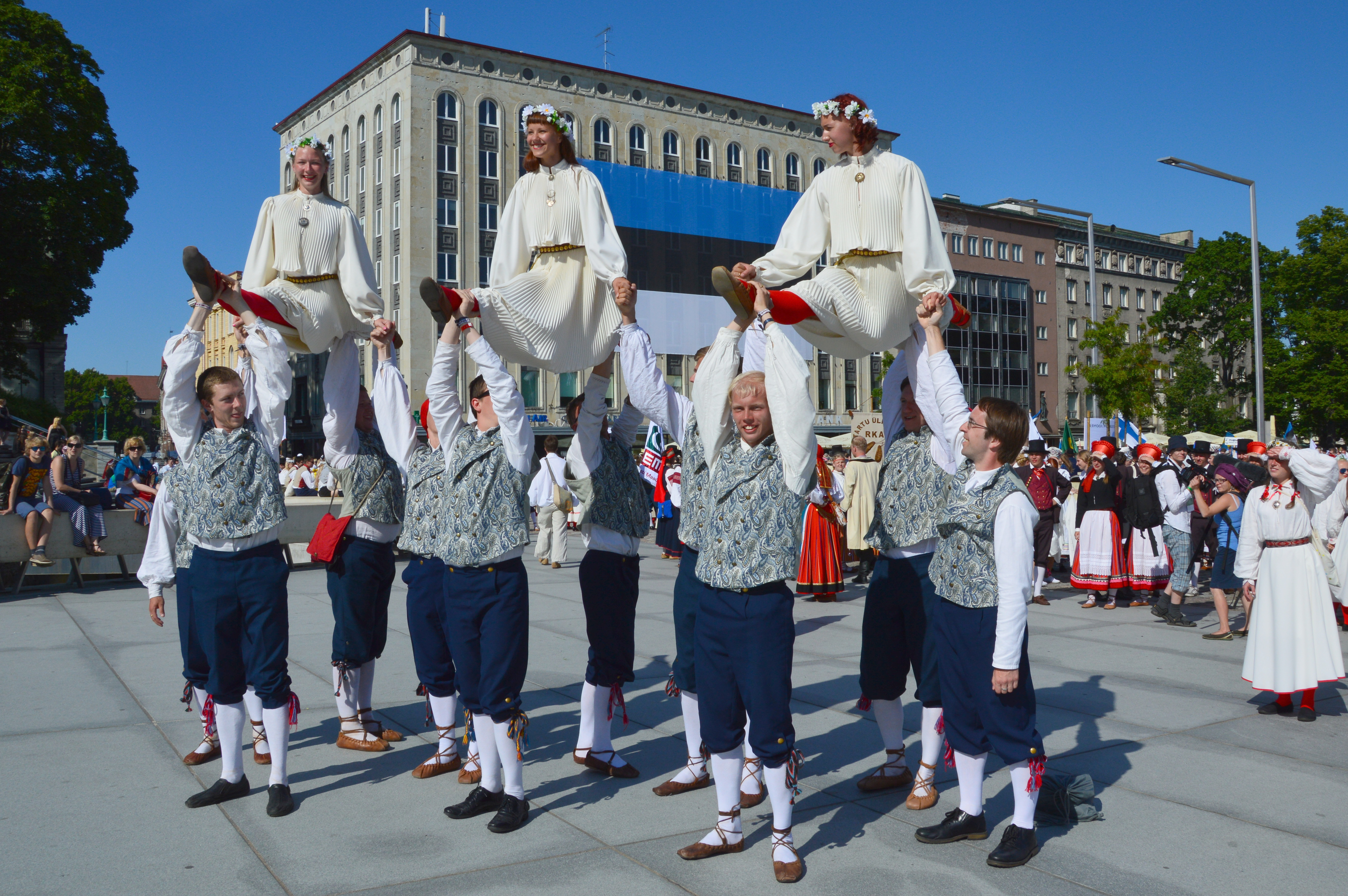 TÜRKA XIX üldlaulupeo rongkäigus